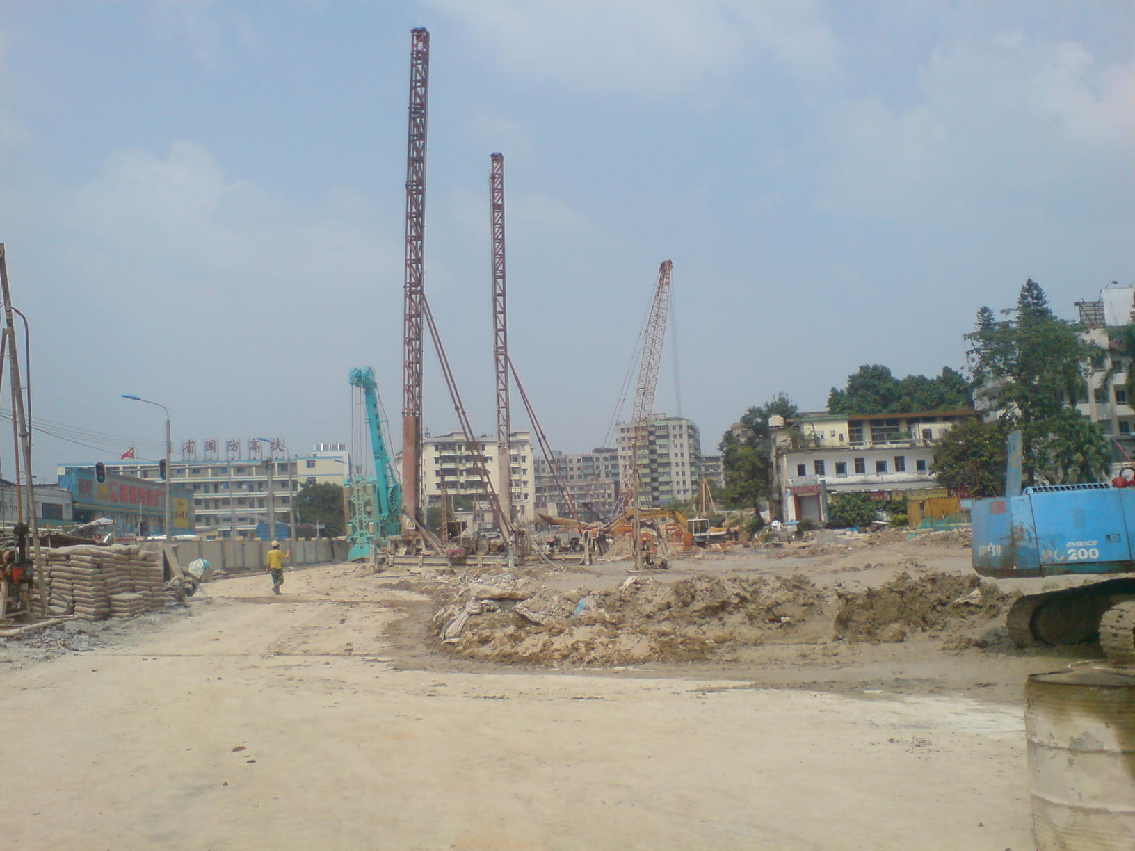 广州地铁同和站正在建设中